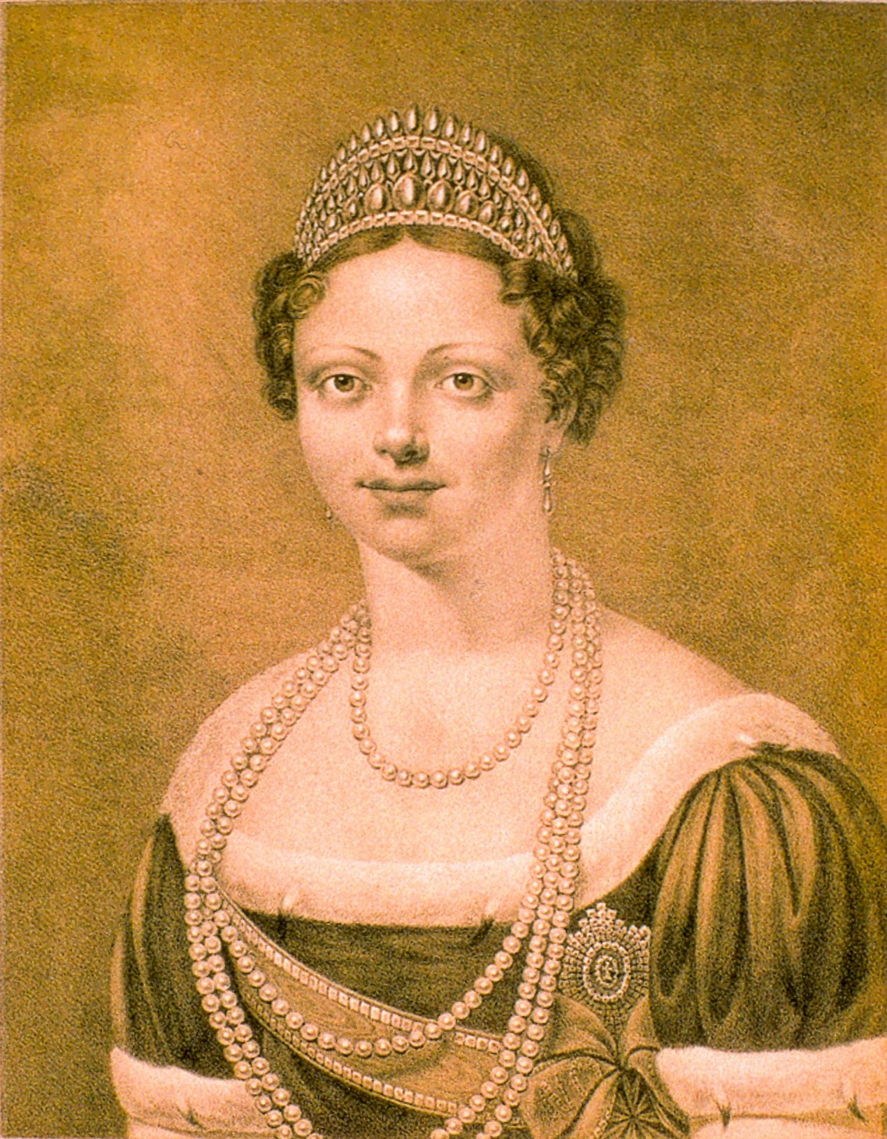 Königin Katharina (1788-1819)